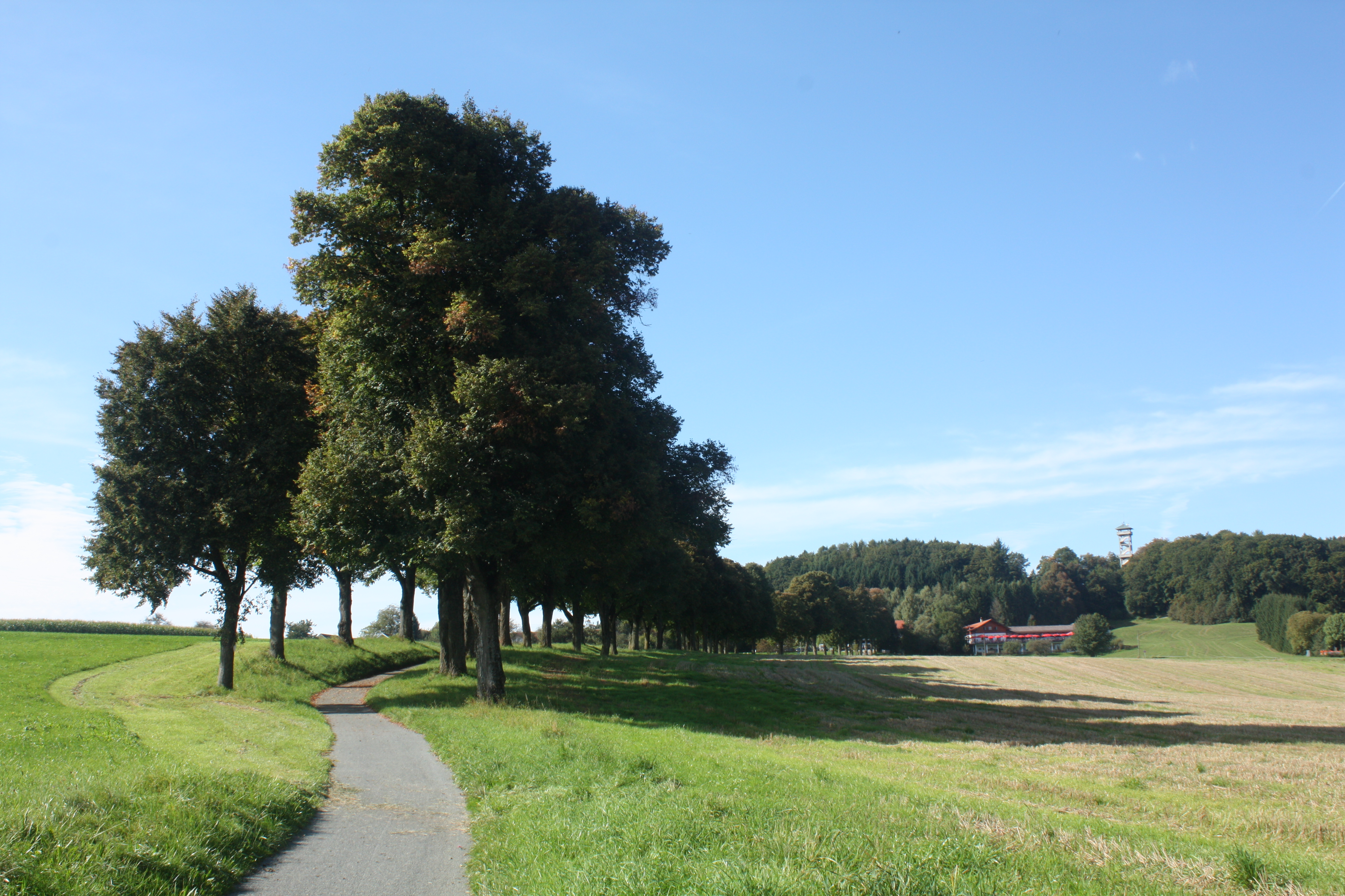 Heldenallee Ebersberg, Mahnmal für die Gefallenen der Stadt im Ersten Weltkrieg